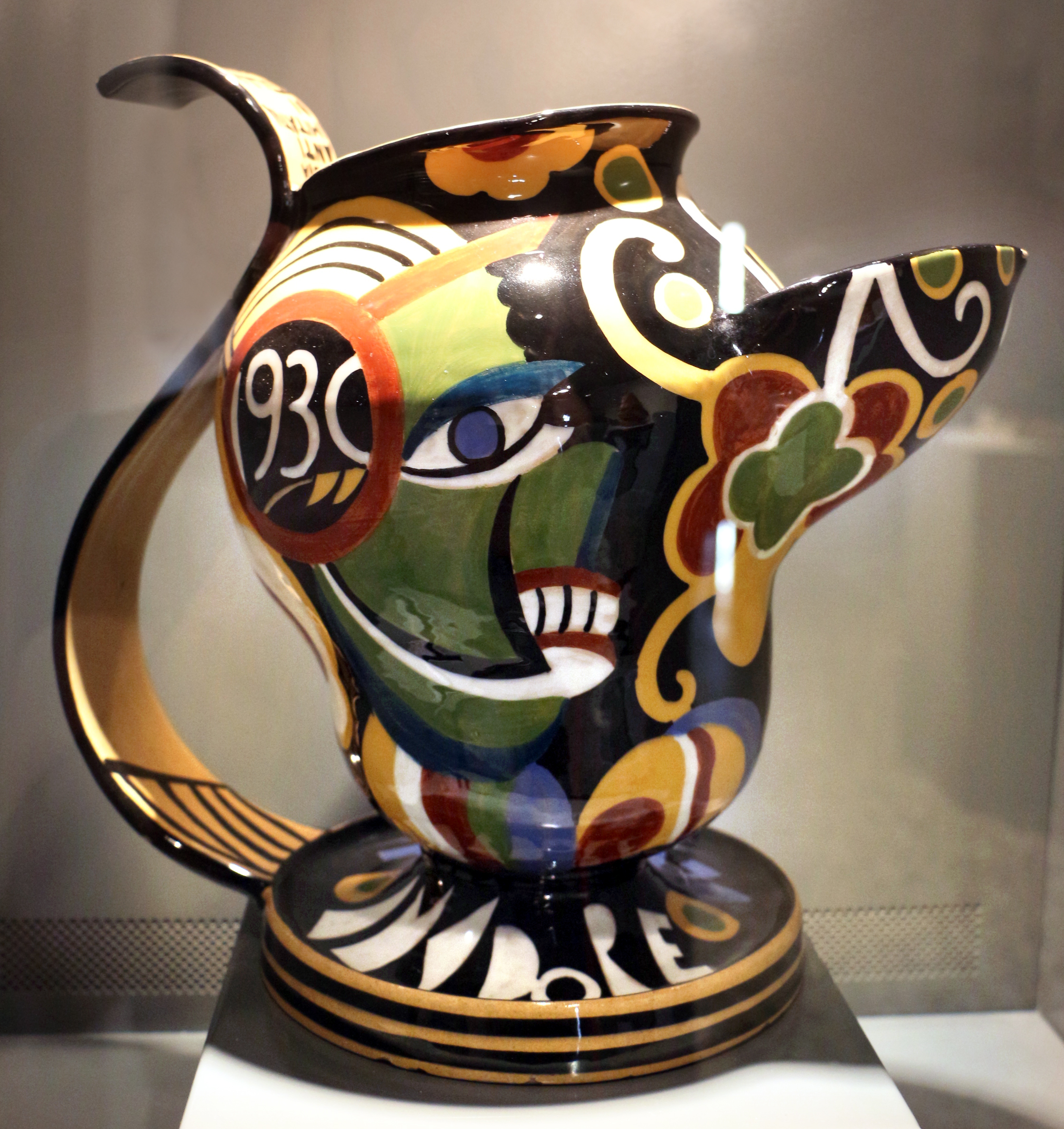 Il parco e i musei di Nervi This is a photo of a monument which is part of cultural heritage of Italy.